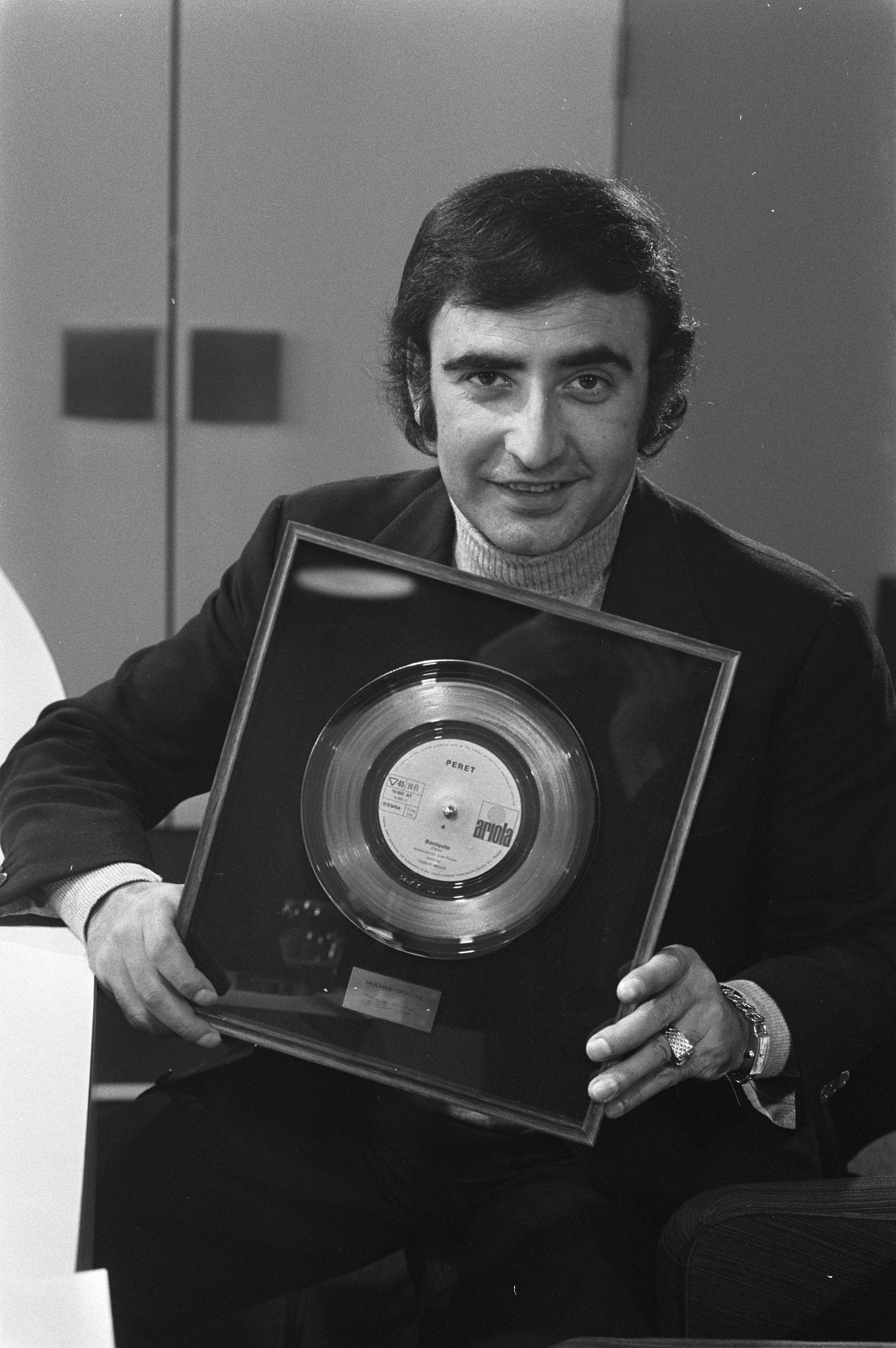 Collectie / Archief : Fotocollectie Anefo Reportage / Serie : [ onbekend ] Beschrijving : Aankomst Spaanse zanger Peret op Schiphol, Peret met gouden plaat Annotatie : Gouden plaat was voor zijn hit "Borriquito" Datum : 17 november 1971 Locatie : Noord-Holland, Schiphol Trefwoorden : aankomsten, zangers Persoonsnaam : Peret Fotograaf : Verhoeff, Bert / Anefo, [onbekend] Auteursrechthebbende : Nationaal Archief Materiaalsoort : Negatief (zwart/wit) Nummer archiefinventaris : bekijk toegang 2.24.01.05 Bestanddeelnummer : 925-1520